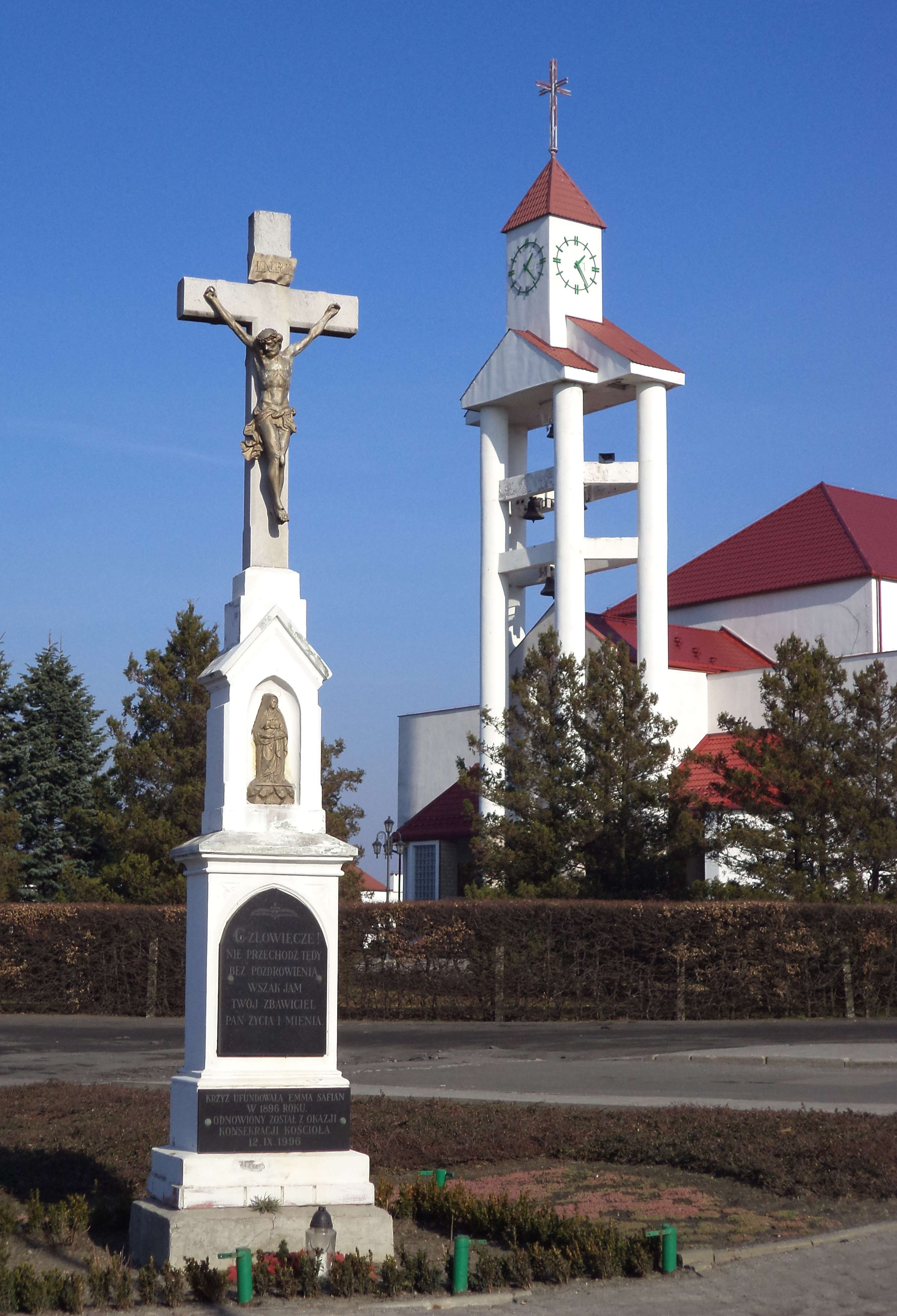 Kościół Matki Boskiej Piekarskiej-Matki Sprawiedliwości i Miłości Społecznej oraz krzyż przydrożny w Tarnowskich Górach-Opatowicach